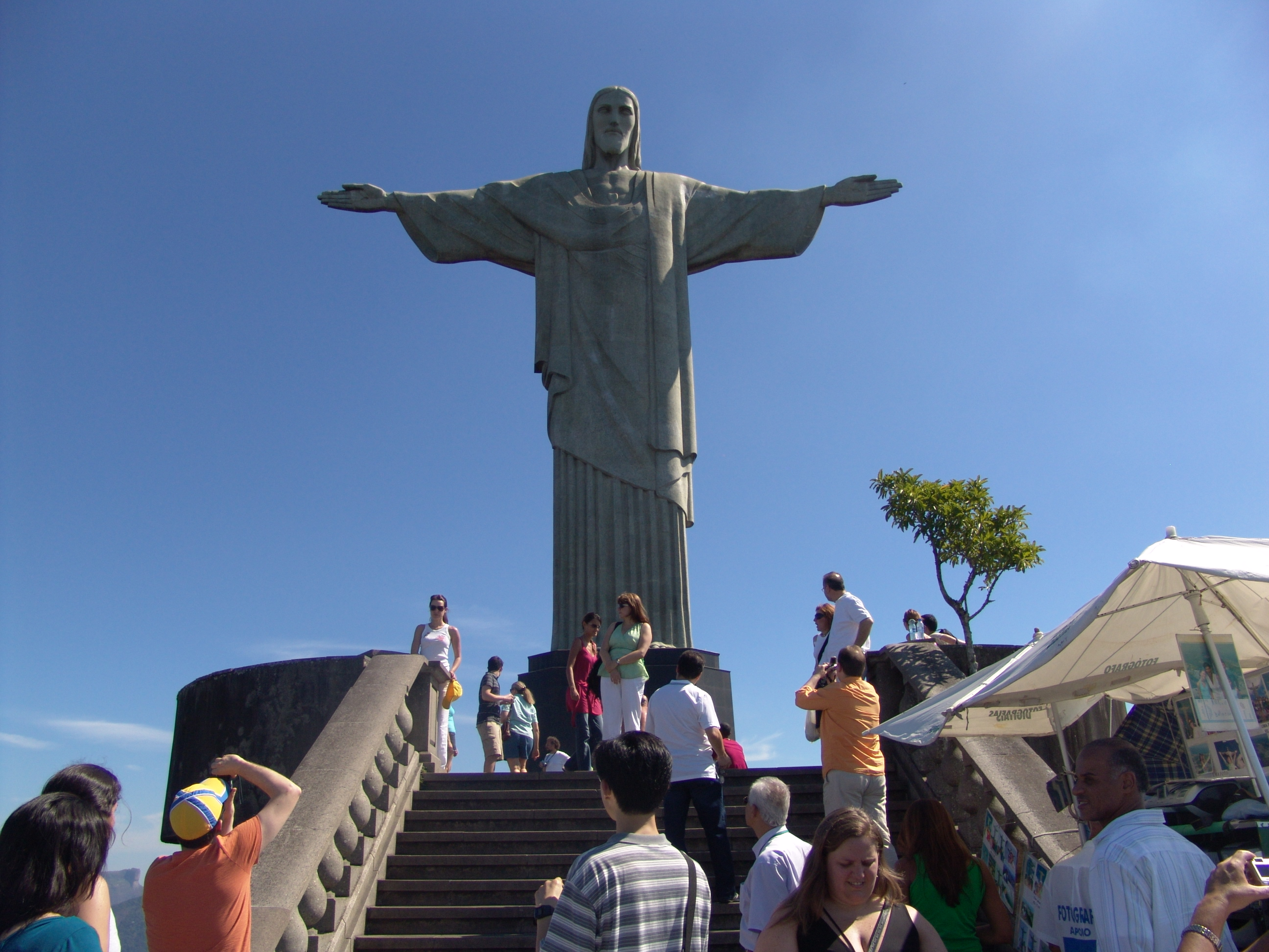 Christusbeeld.